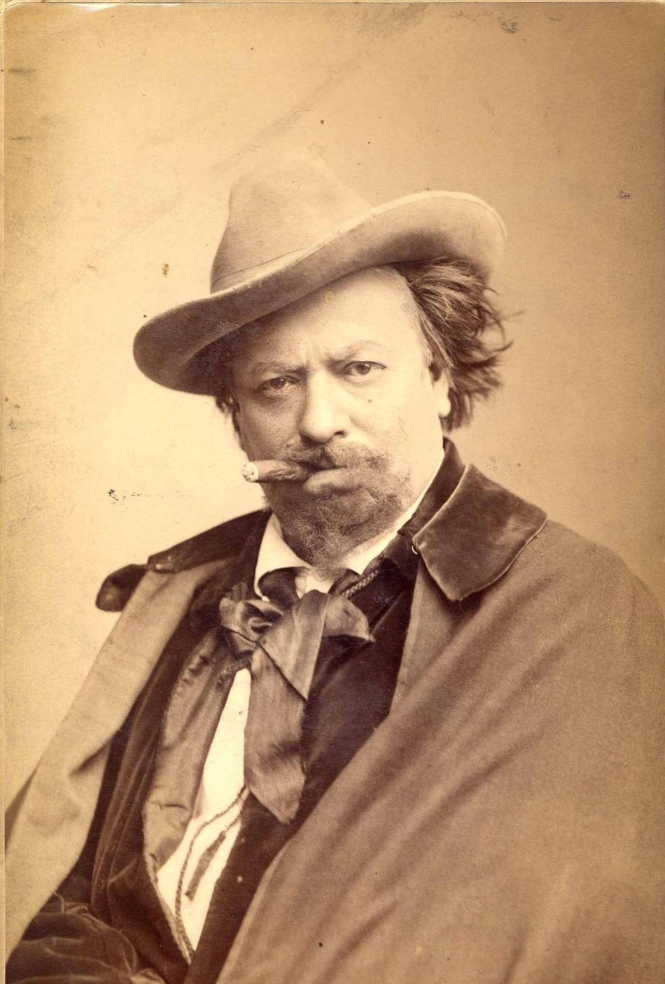 Hauptmann, Gerhart: Crampton mester. Nemzeti Színház. Bemutató: 1897-10-08. Crampton mester: Újházi Ede, Felvétel ideje: 1897; Technika: Matt albumin, A kép Hátoldalán: "Puckovics Győzőke ka Buda 1899. augusztus 24 Újházi Crampton "